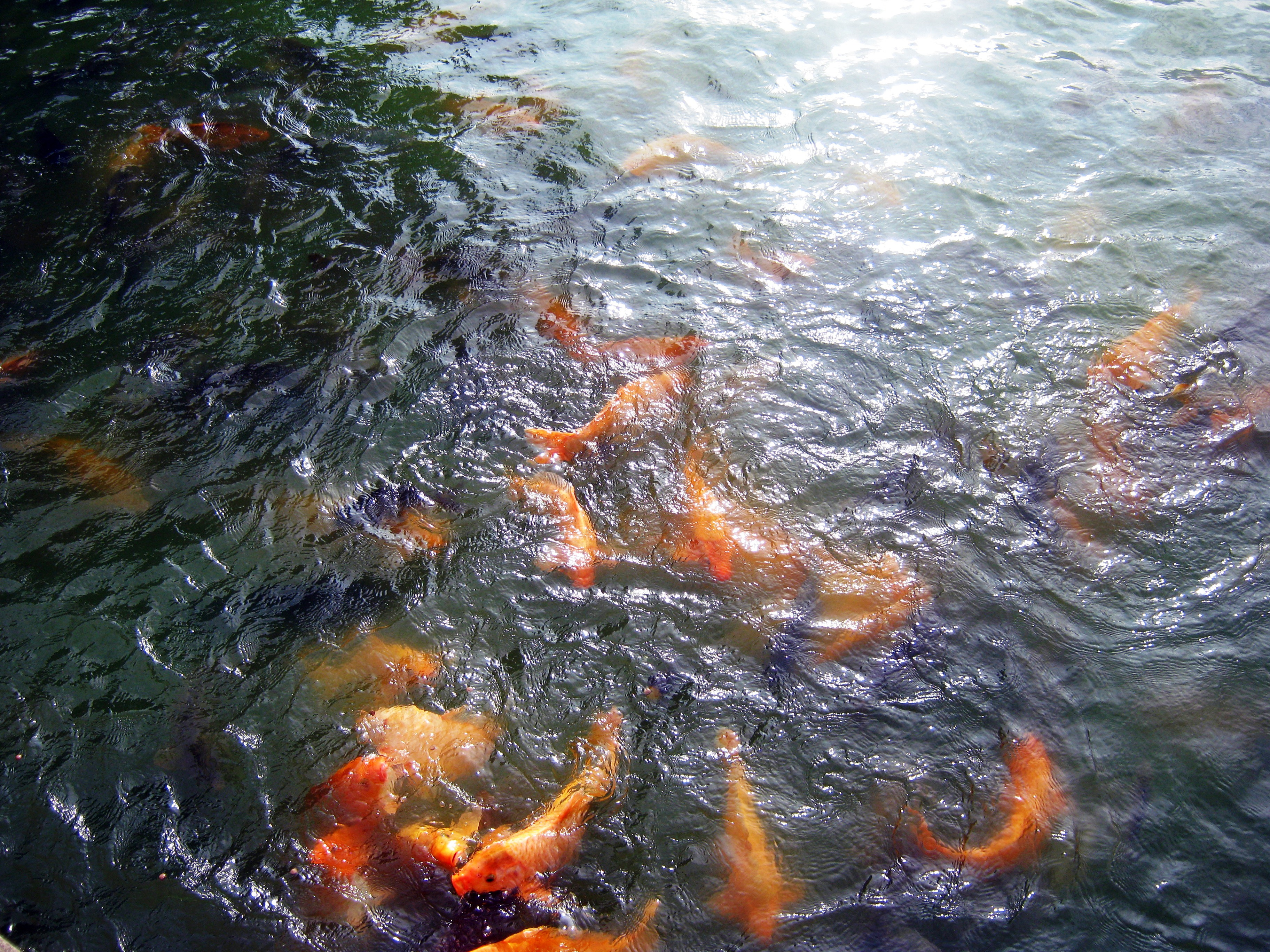 Cá phóng sinh (nhiều nhất là cá chép) trong hồ Thủy Liêm trên đỉnh núi Cấm (Tịnh Biên, An Giang, Việt Nam).